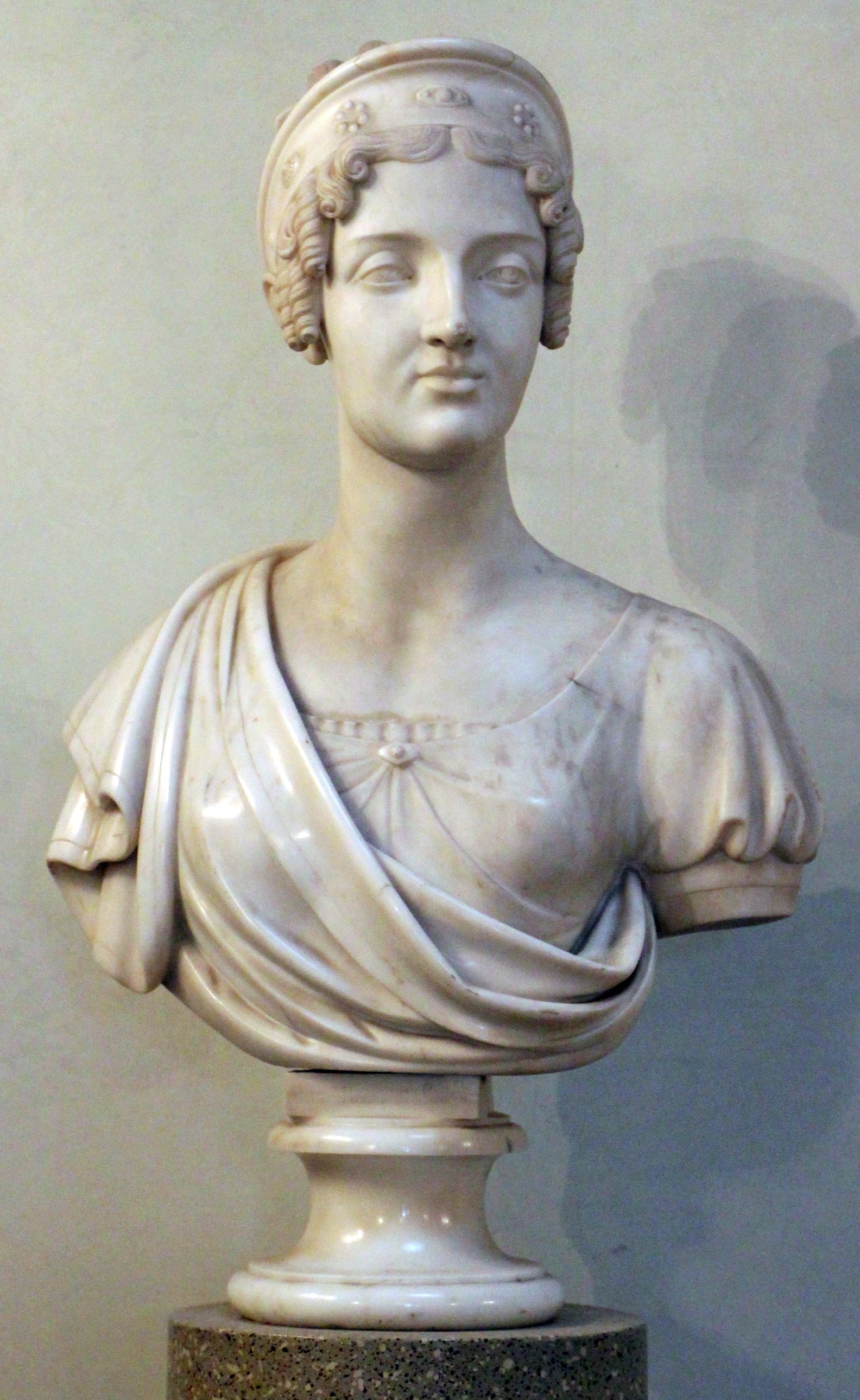 Villa di Poggio Imperiale - Sala Bianca